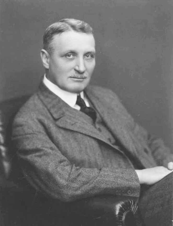 Ernst Torulf